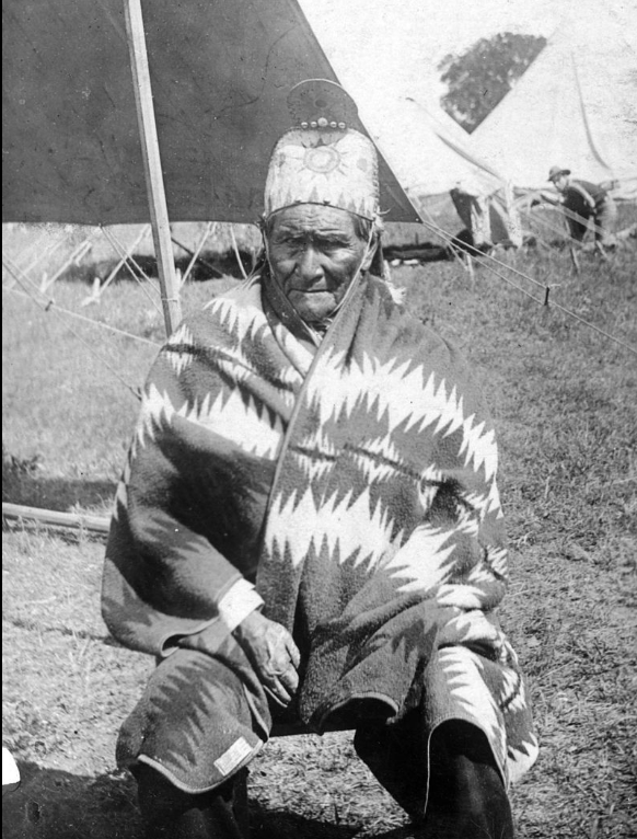 미국 포로 제로니모